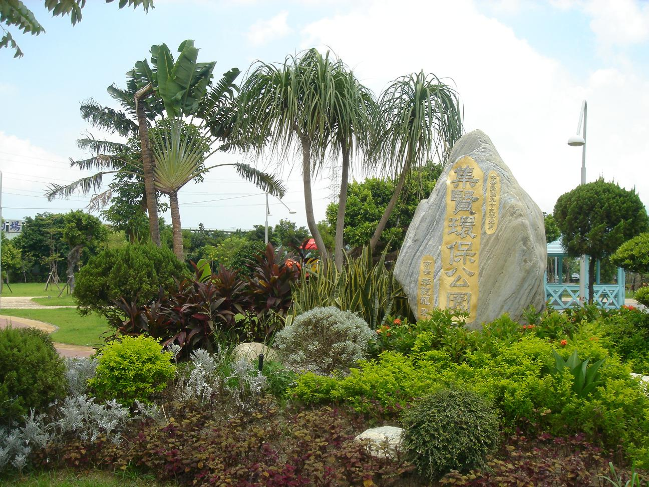 台北縣三重市集賢路集賢環保公園公園石碑小型造景區。